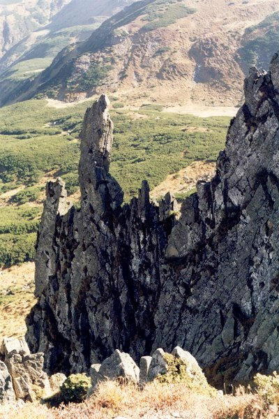 Żebra skalne pod szczytem Szpyci w paśmie Czarnohory (Karpaty Wschodnie, Ukraina)